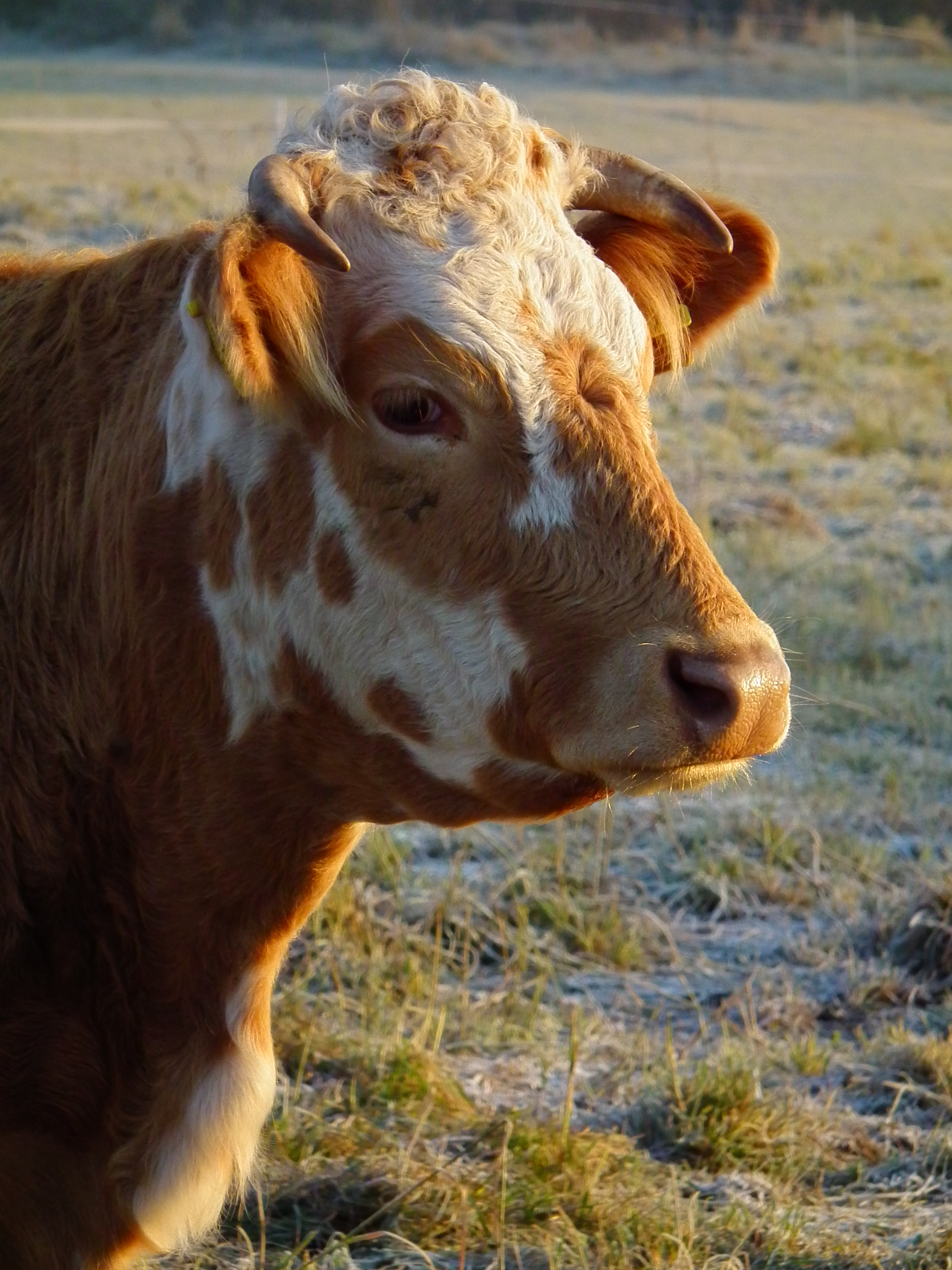 Kuh mit Hörnern, fotografiert auf der Tromm (Hessen, Deutschland)